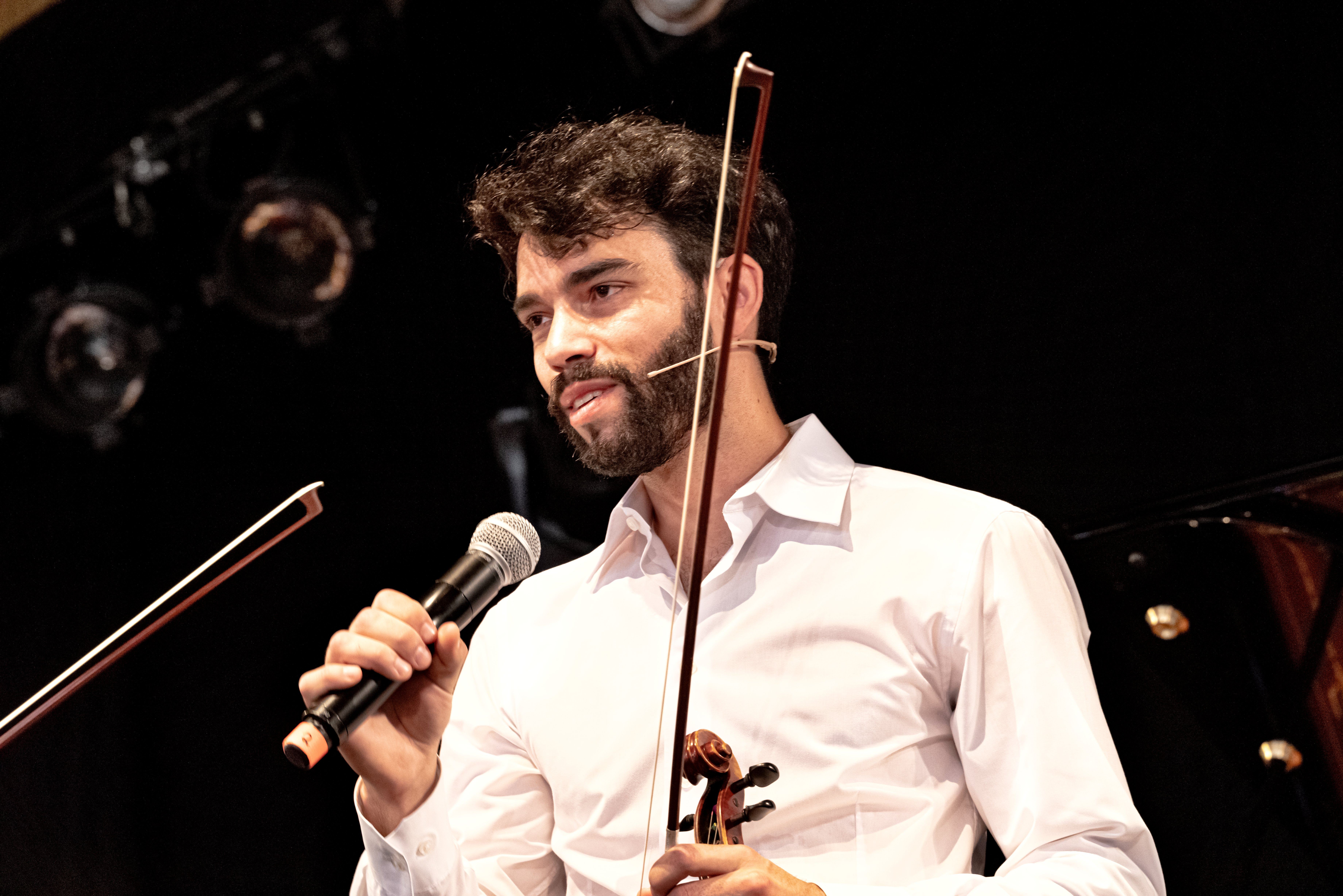 Bilder vom Zelt Musik Festival 2019 in Freiburg im Breisgau Hier die Matinee "Die_kleine_Fiesta"